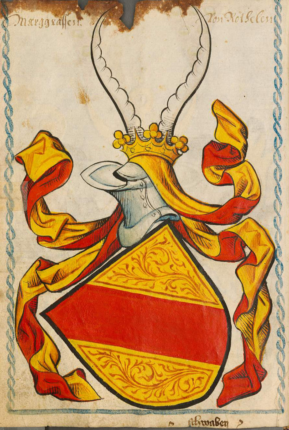 Scheibler’sches Wappenbuch, älterer Teil; Seite 16 Marggraffen von Röthelen Schwaben